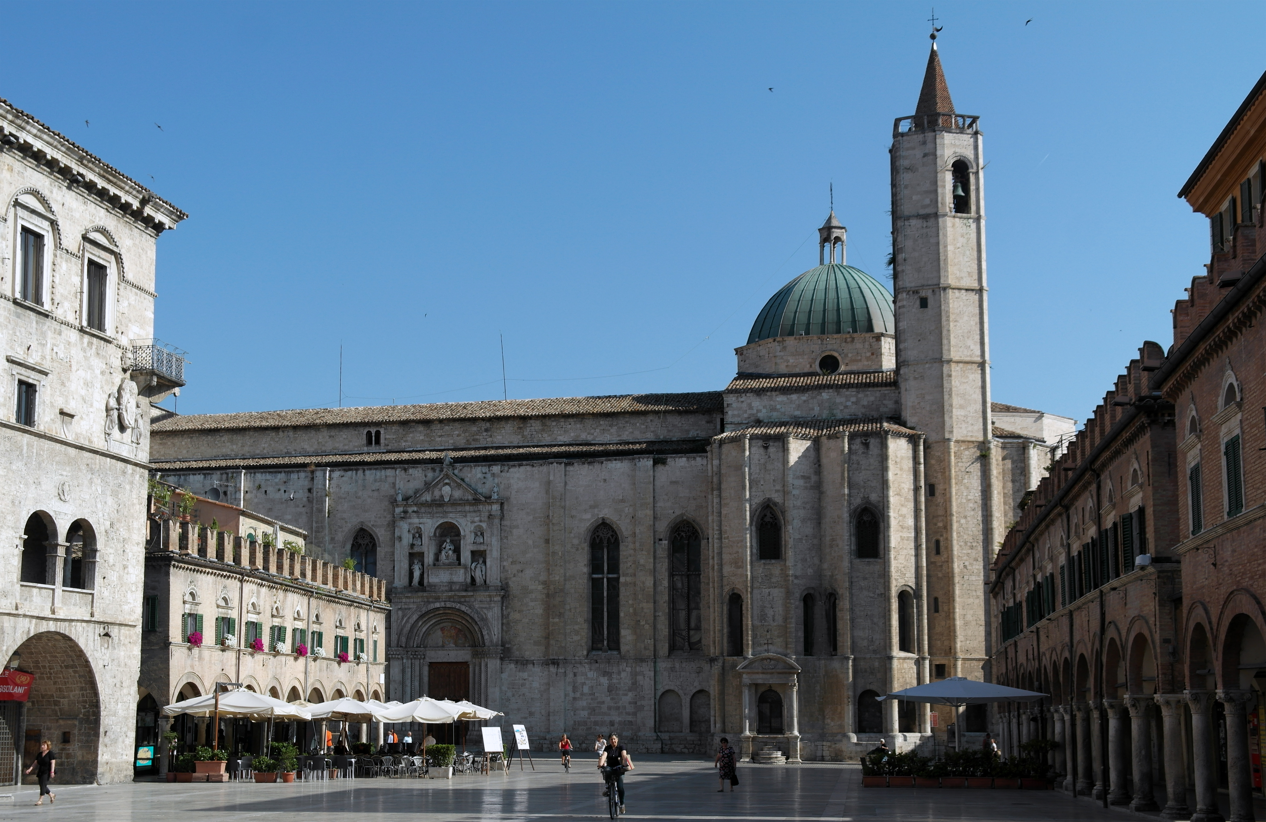 centro storico, 63100 Ascoli Piceno AP, Italy